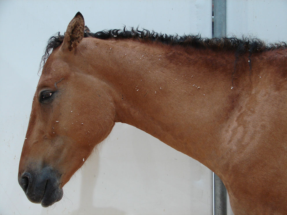 American Curly Horse im Sommerfell, am 21 Juli 2006 auf der Eurocheval in Offenburg fotografiert. Man beachte die Locken im Ohr und an der Mähne. Fotografiert von Monika Kind, Rickenbach. Das Pferd heißt CCG Spotted Crow, geb. 3.6.2003, Vater: Dry Creek Dun, Mutter: Aishihik Bay. Farbe: Snowflake Dun, Stockmaß: 152 cm und ist zum Zeitpunkt des Fotos in Besitz von: Gabriele Kärcher CCG Crow Curlys Germany Reisser 17 D - 78733 Aichhalden Tel. (07422) 244194 Fax (07422) 244195